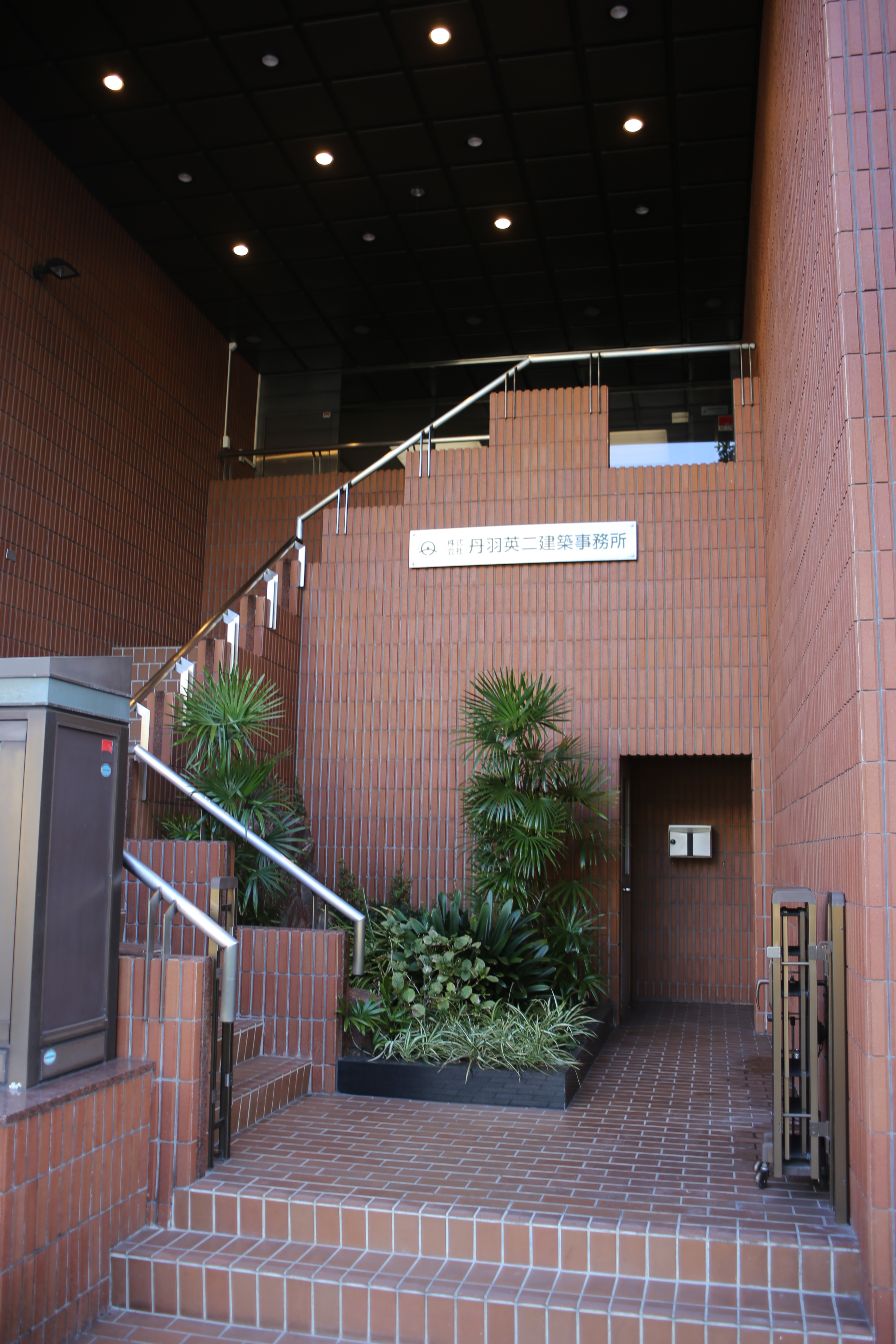 名古屋市中区金山二丁目の丹羽英二建築事務所